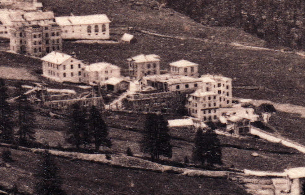 Pontresina, Baustelle der Holy Trinity Church und des Hotels Pontresina, vergrösserter Ausschnitt